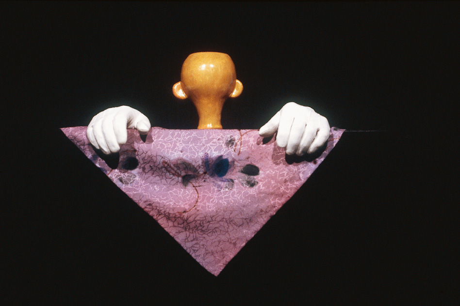 Ur föreställningen med bara händerna